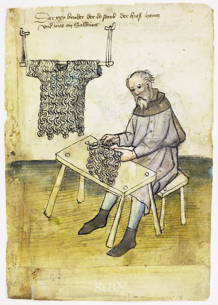 heintz (Heinz) N.N. , Salbürett (Sarwürker; Salwirt; Salwürker; Kettenhemdmacher; Panzerhemdenmacher) Transkription und weitere Informationen